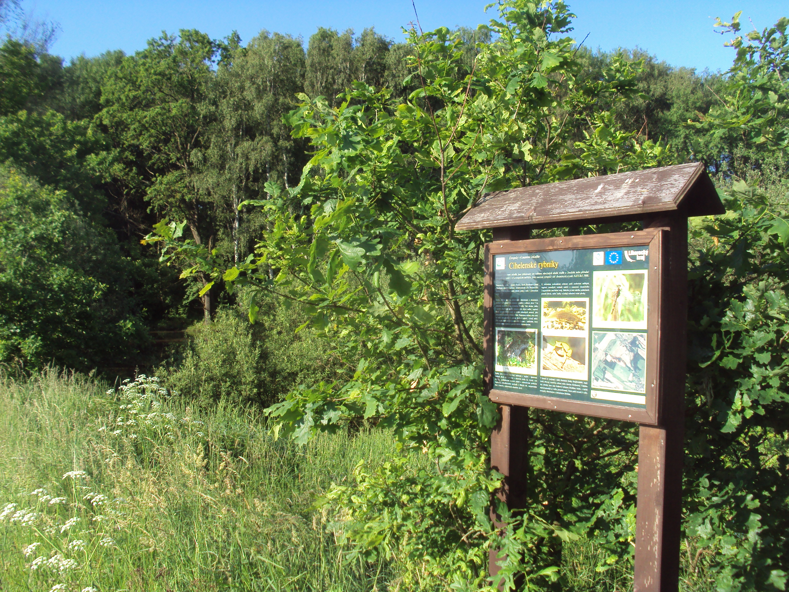 Tabule u PP Cihelenské rybníky, katastr Horní Libchava